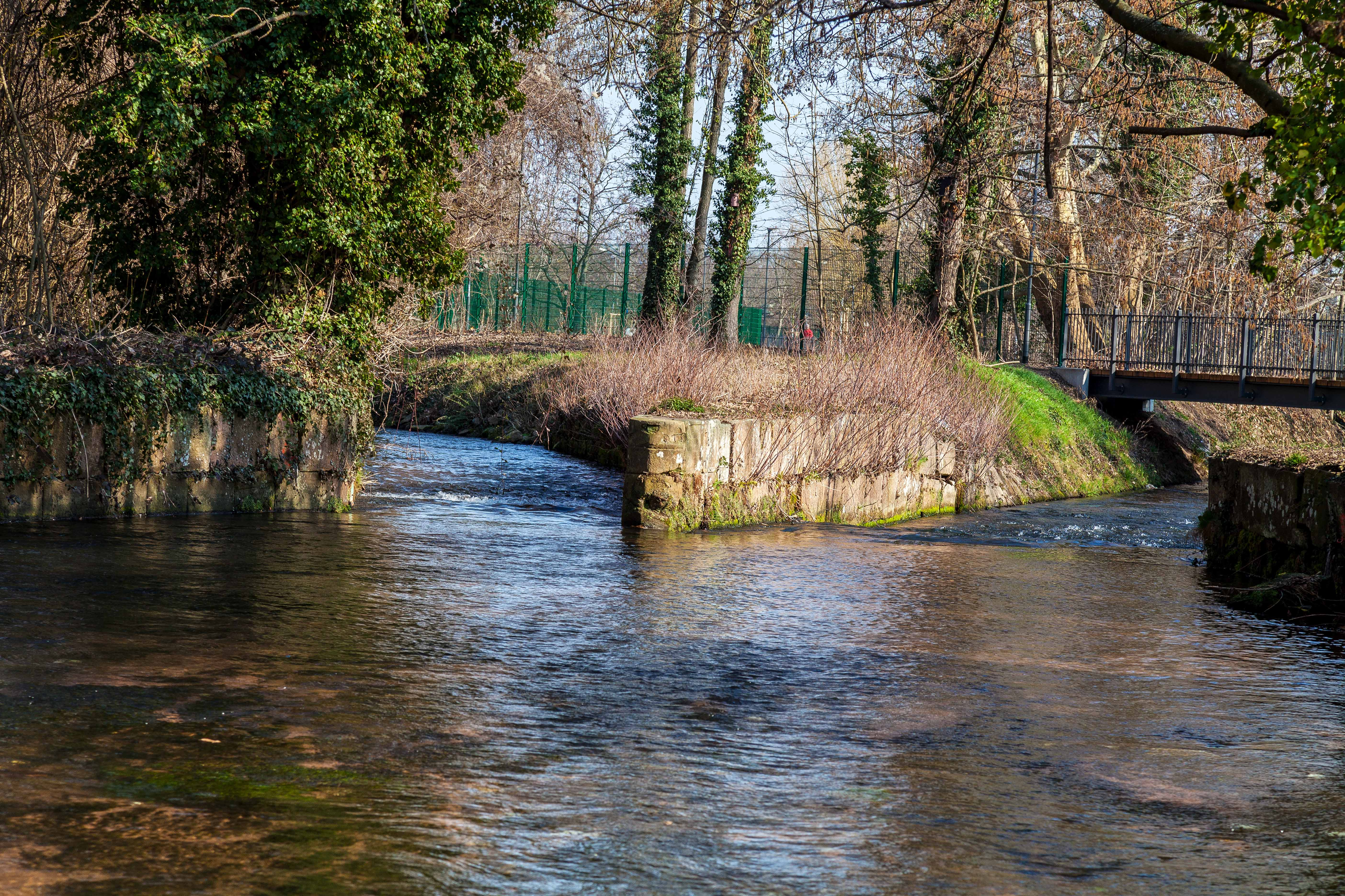 Winzinger Gescheid, links Rehbach - rechts Speyerbach